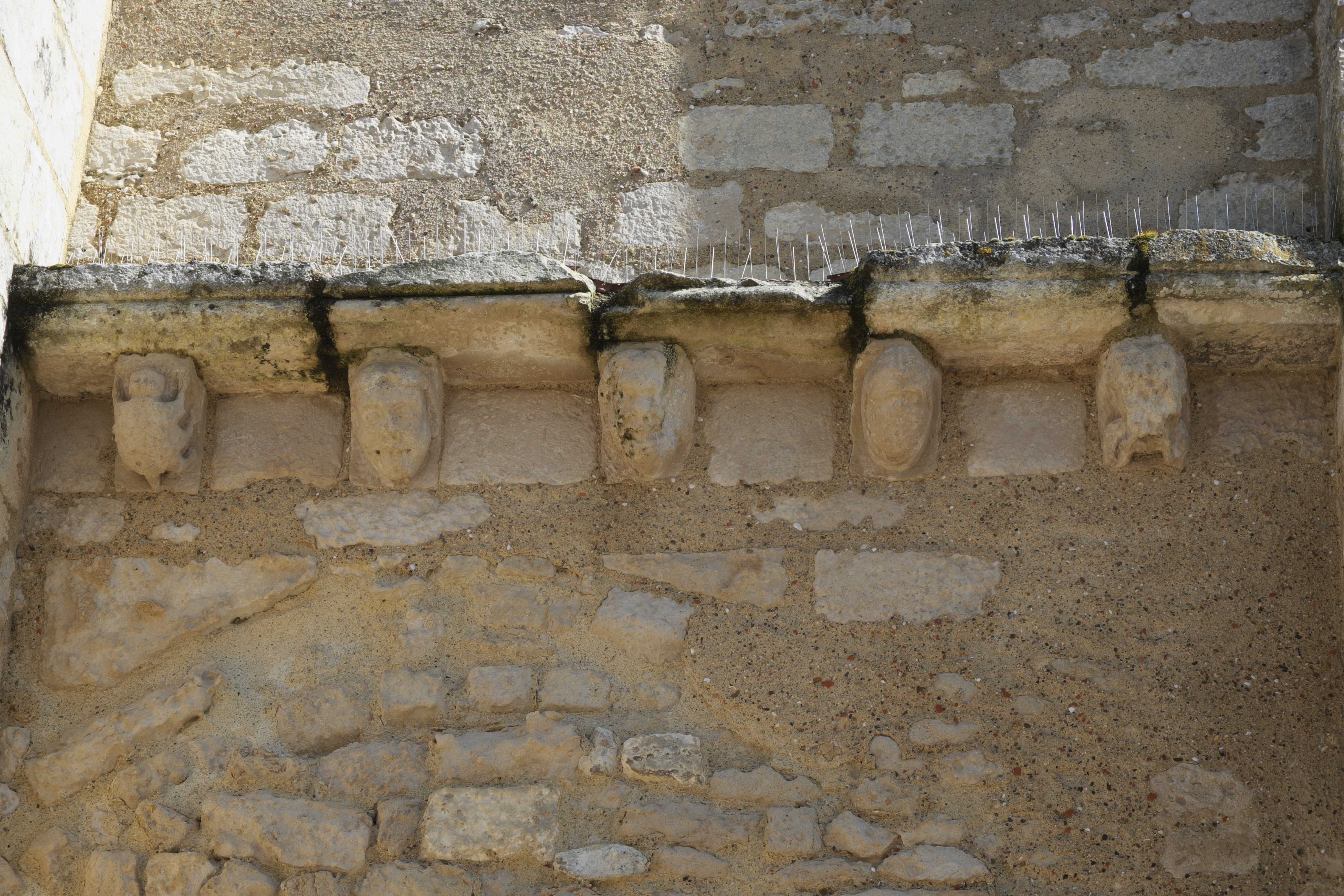 Katholische Kirche Notre-Dame-des-Anges in Angles im Département Vendée (Pays de la Loire/Frankreich), Kragsteine